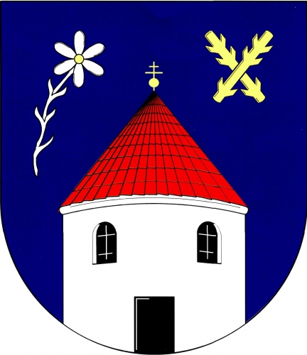 znak, Častohostice, okres Třebíč